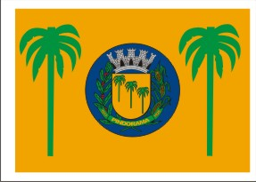 Bandeira da cidade de Pindorama, SP